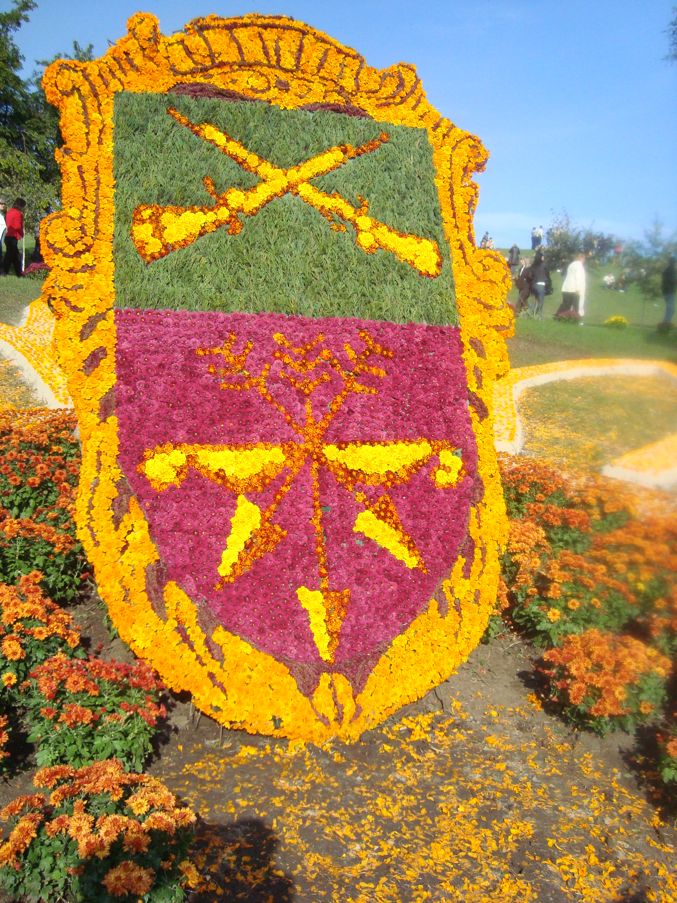 Запорожье. День города. Герб города из специально выращенных цветов.